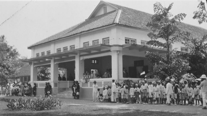 Foto. Bewoners van Ende op Flores tijdens een feestdag, vermoedelijk bij de woning van de assistent-resident